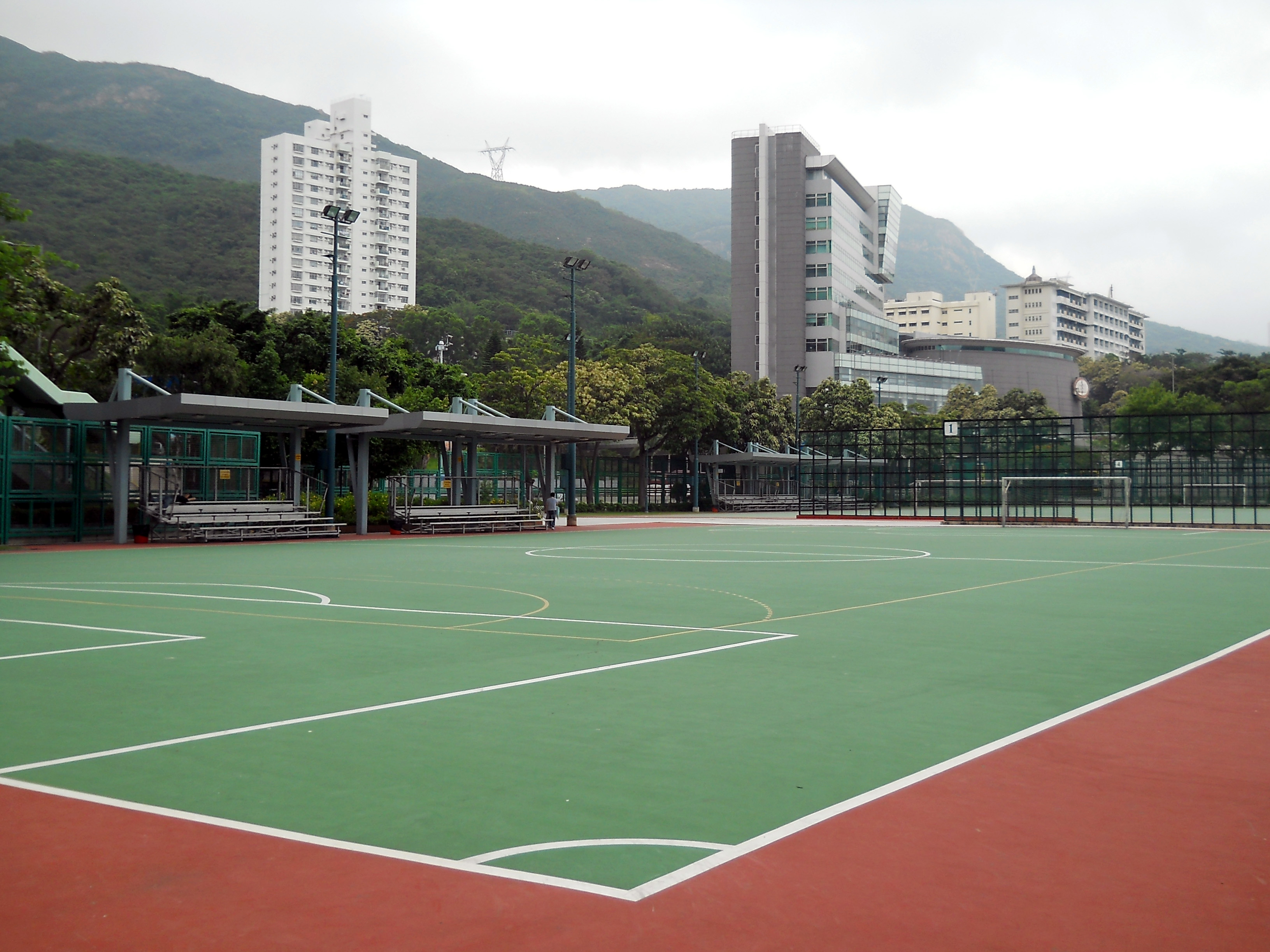 中文（香港）: 黃竹坑遊樂場